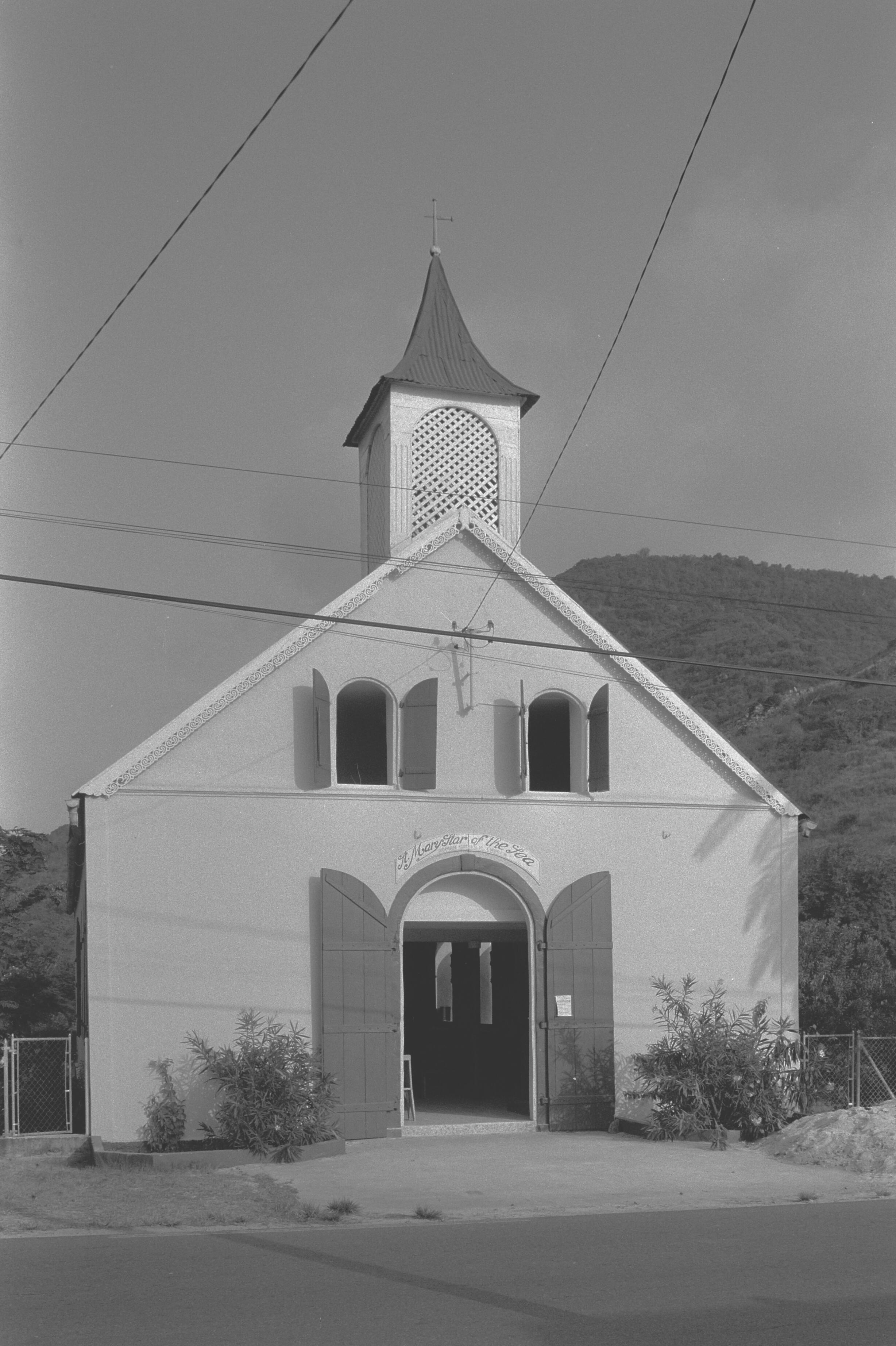 Kerk, voorzijde Onderwerp: kerken